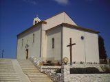 Bilice crkva